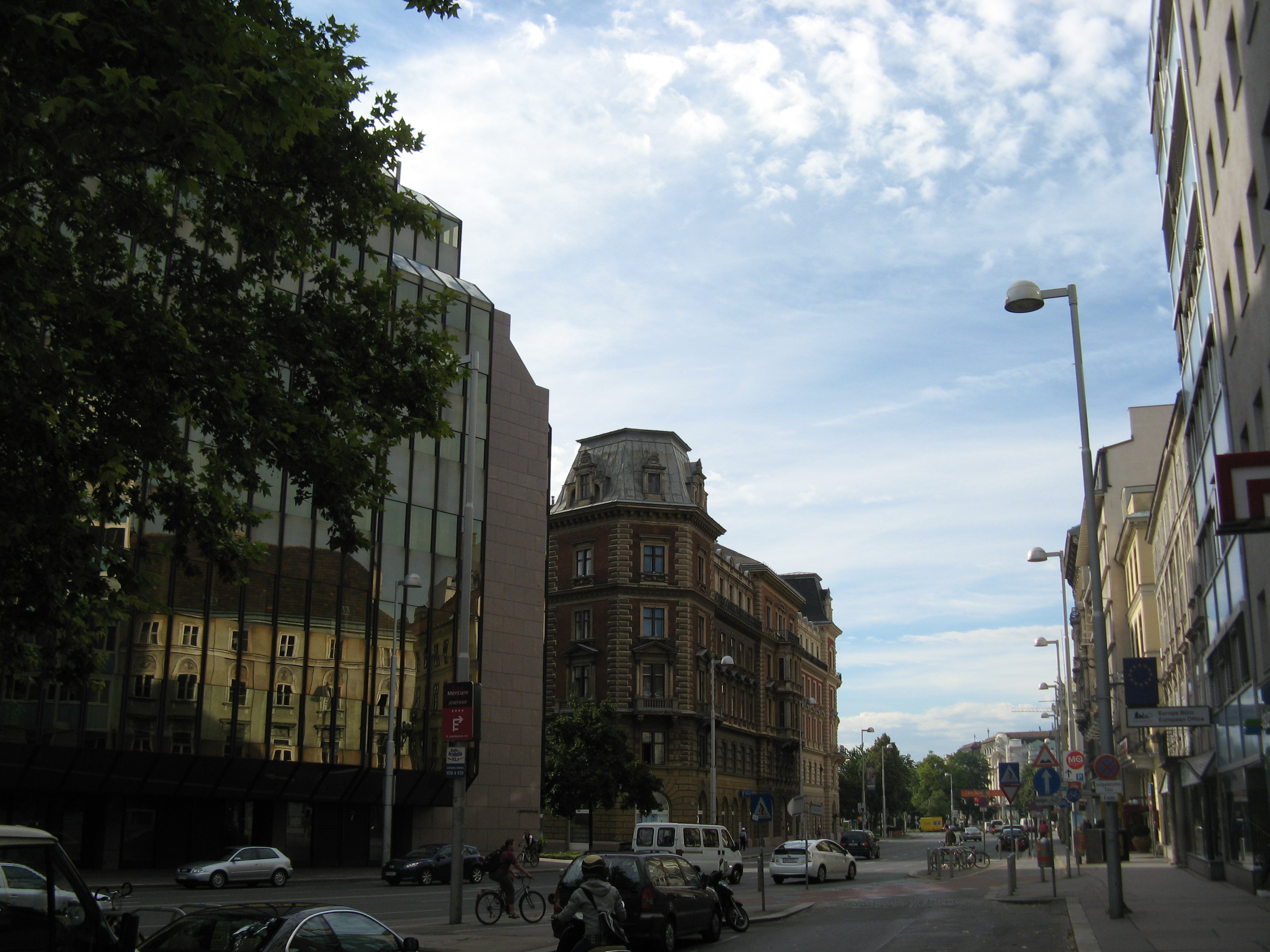 Auerspergstraße, Wien-Josefstadt